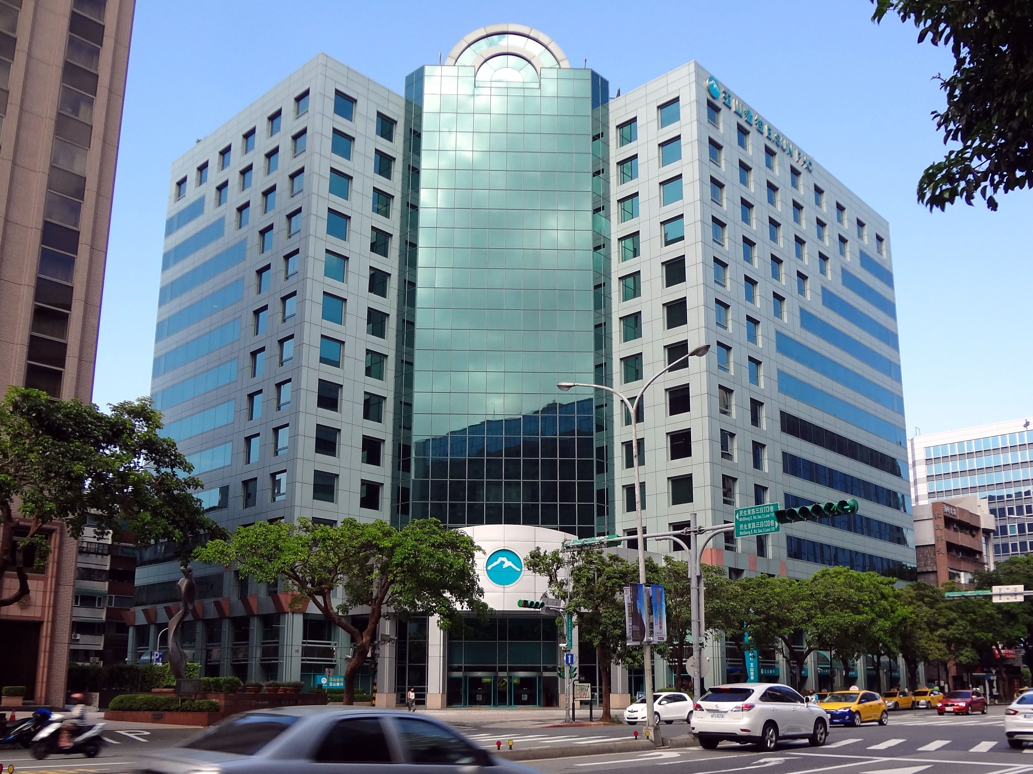 玉山金融大樓。